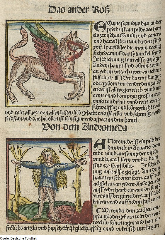 Original image description from the Deutsche Fotothek Astronomie & Sternbild